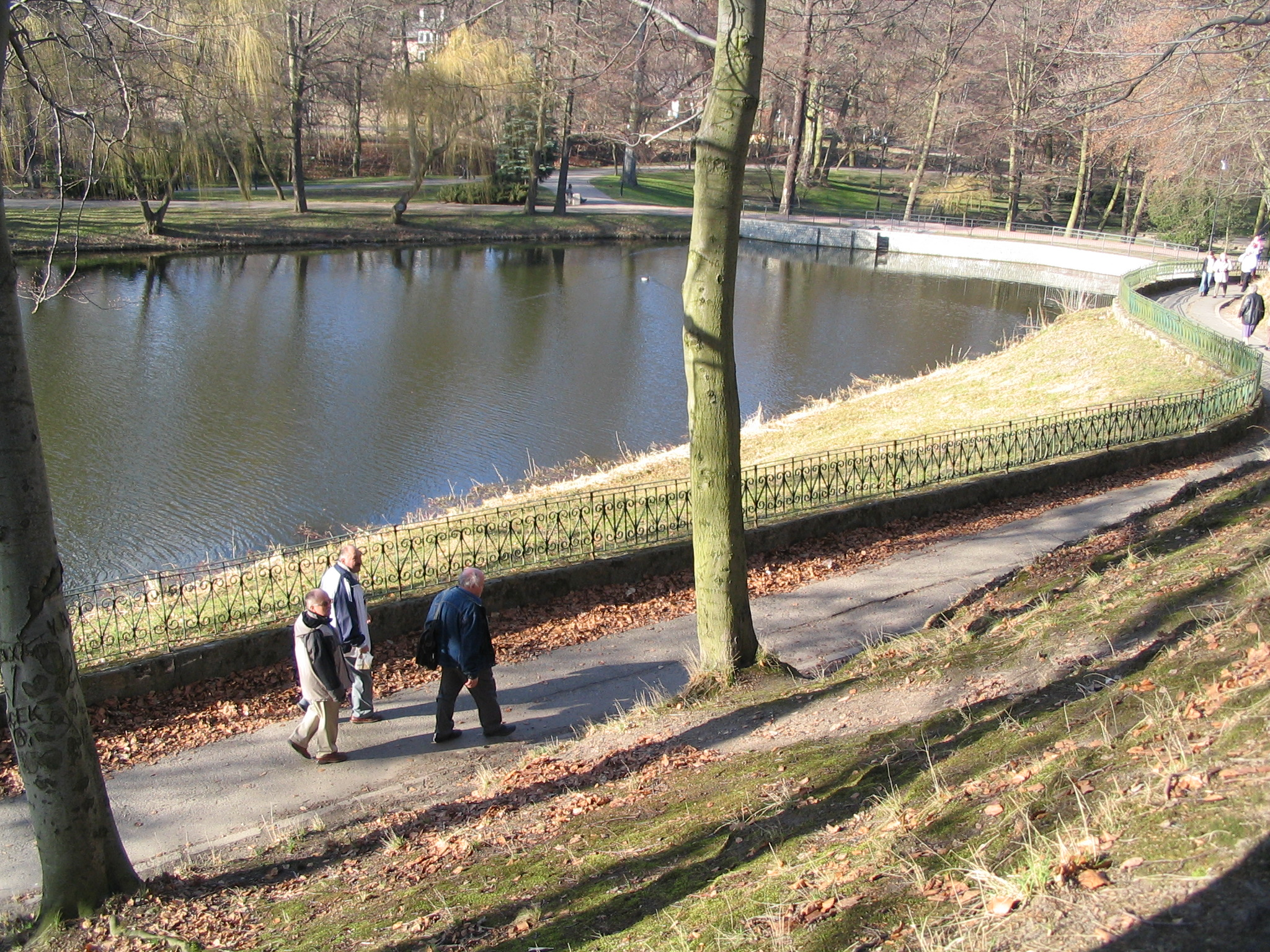 Staw Oruński, Orunia, Gdańsk